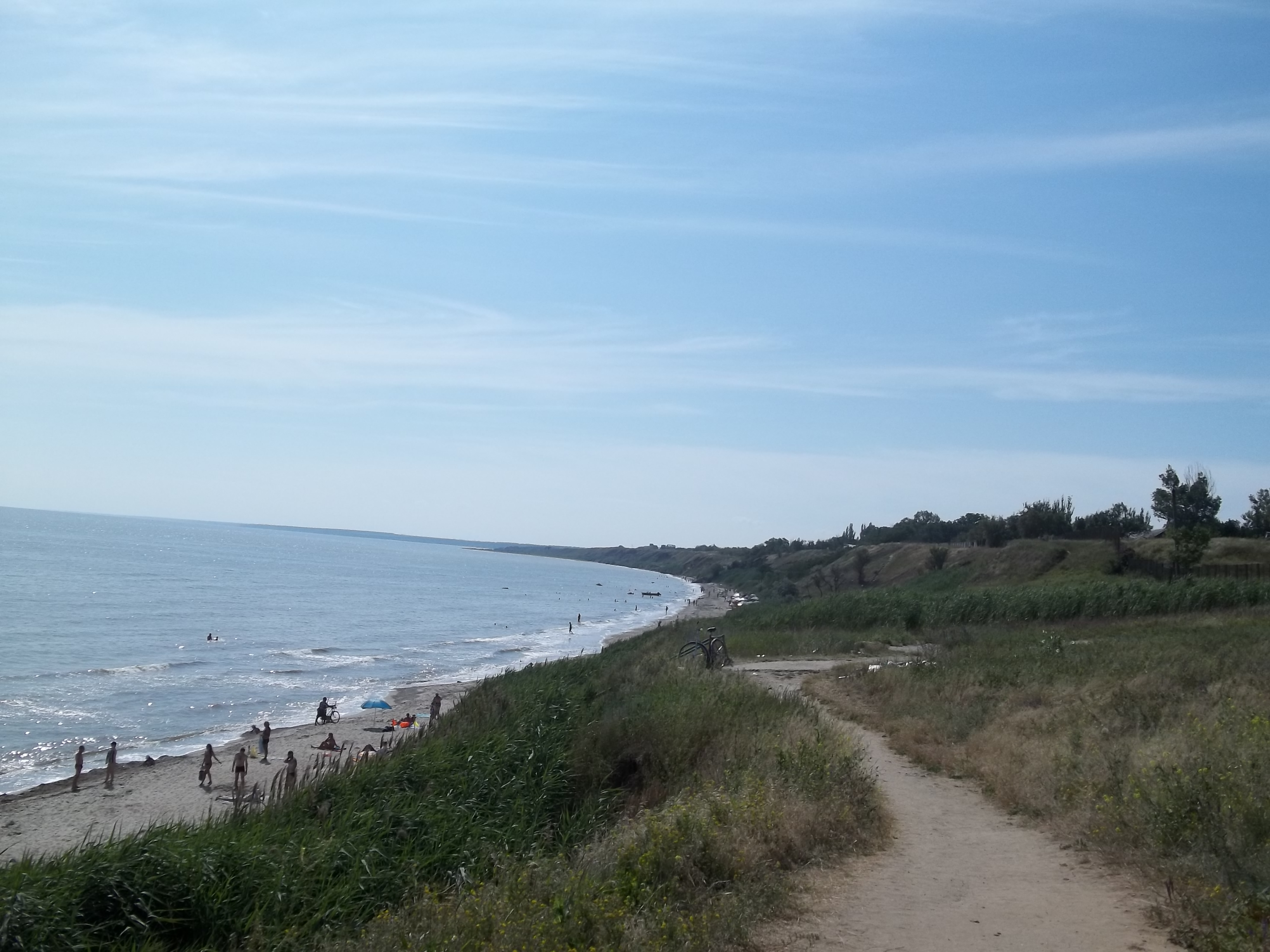 город Бердянск пляж района АКЗ